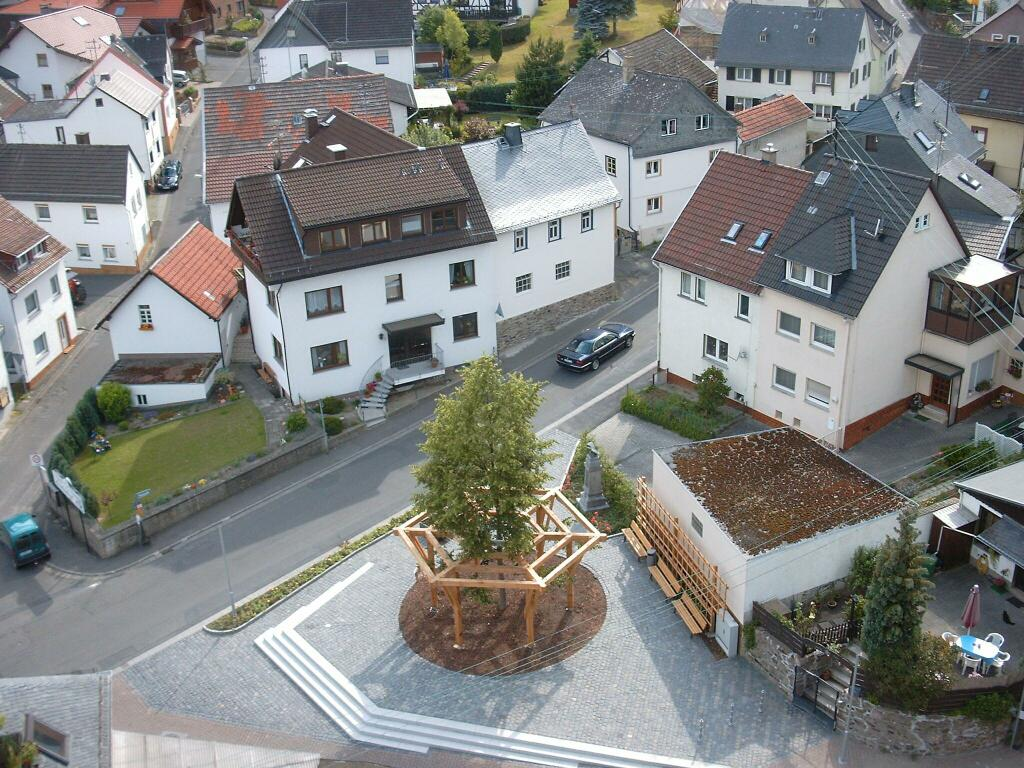 Blick vom Kirchturm auf den Lindenplatz 2004